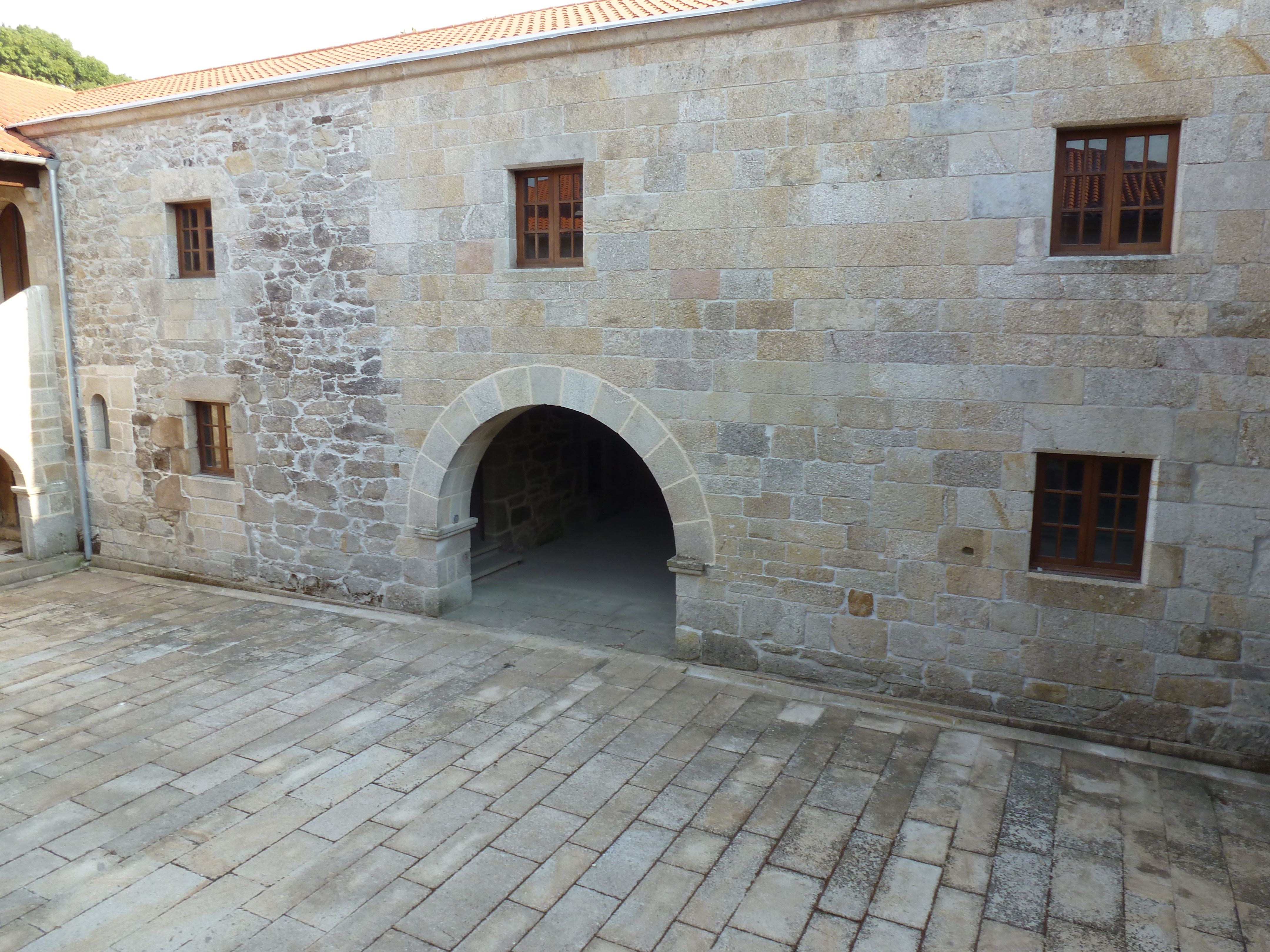 Pazo de Cartelos, Carballedo, Lugo